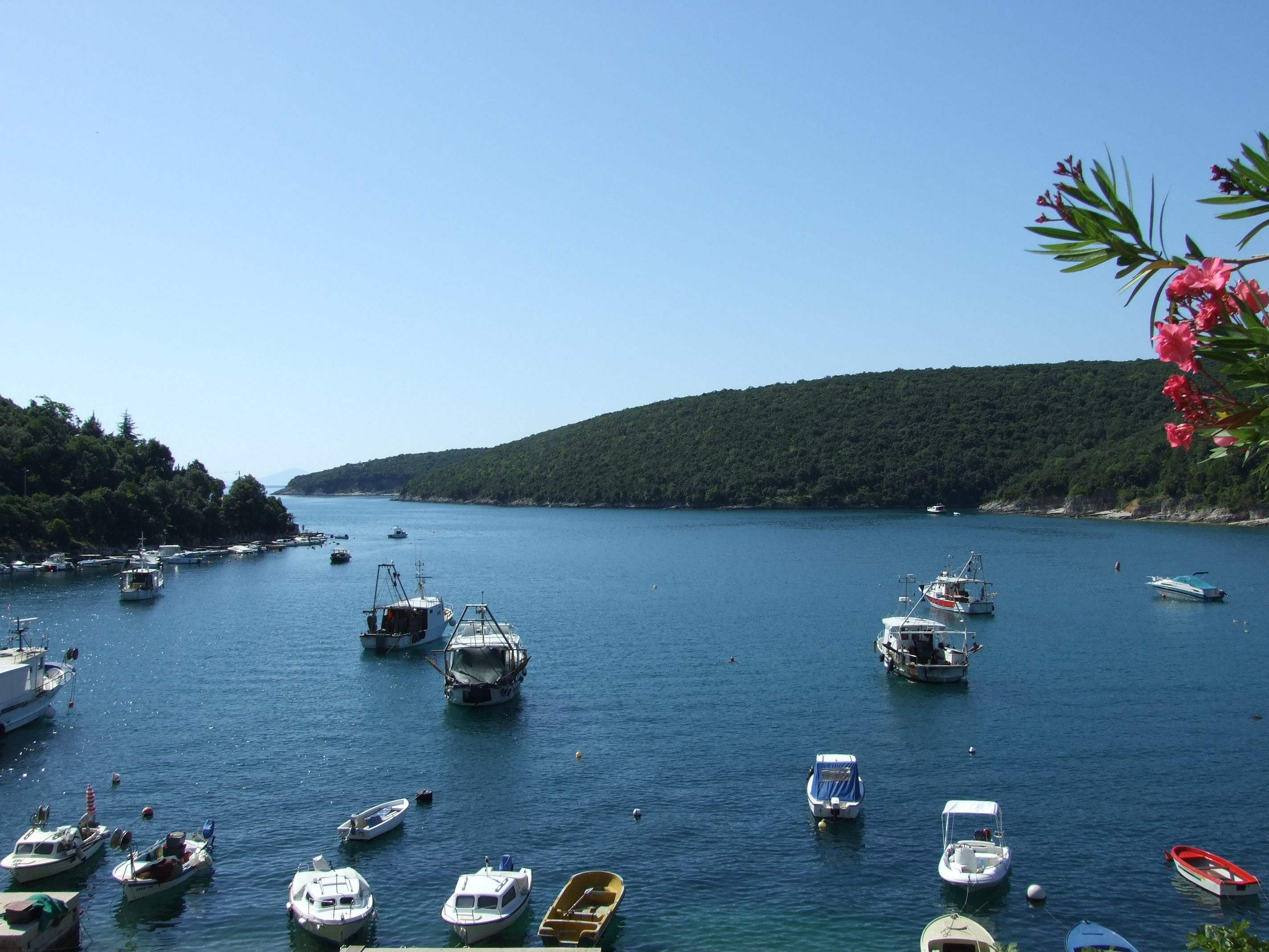 Krnica Panorama